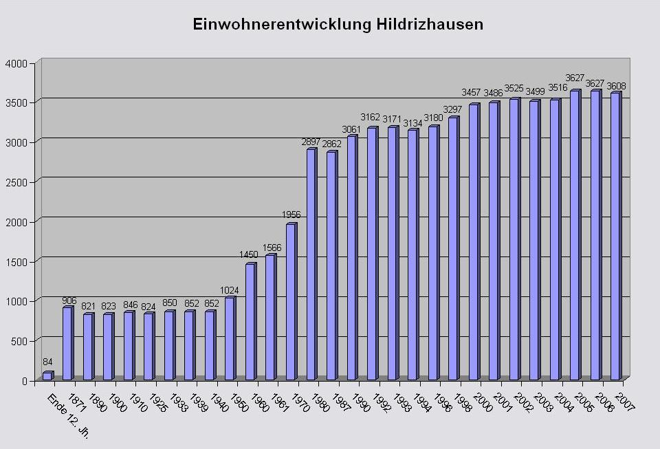 Diagramm über die Einwohnerentwicklung in der Gemeinde Hildrizhausen